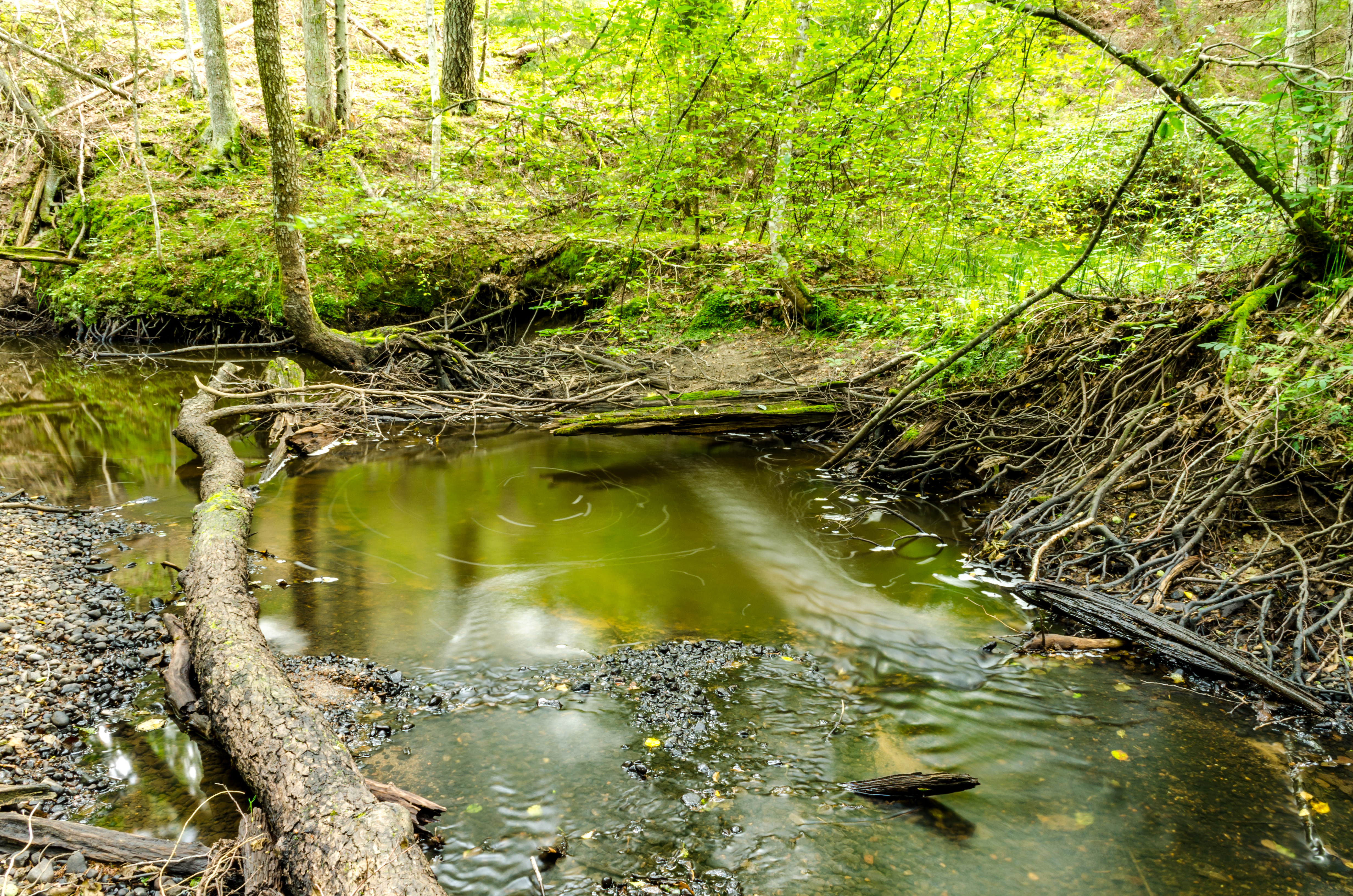 Kolga oja